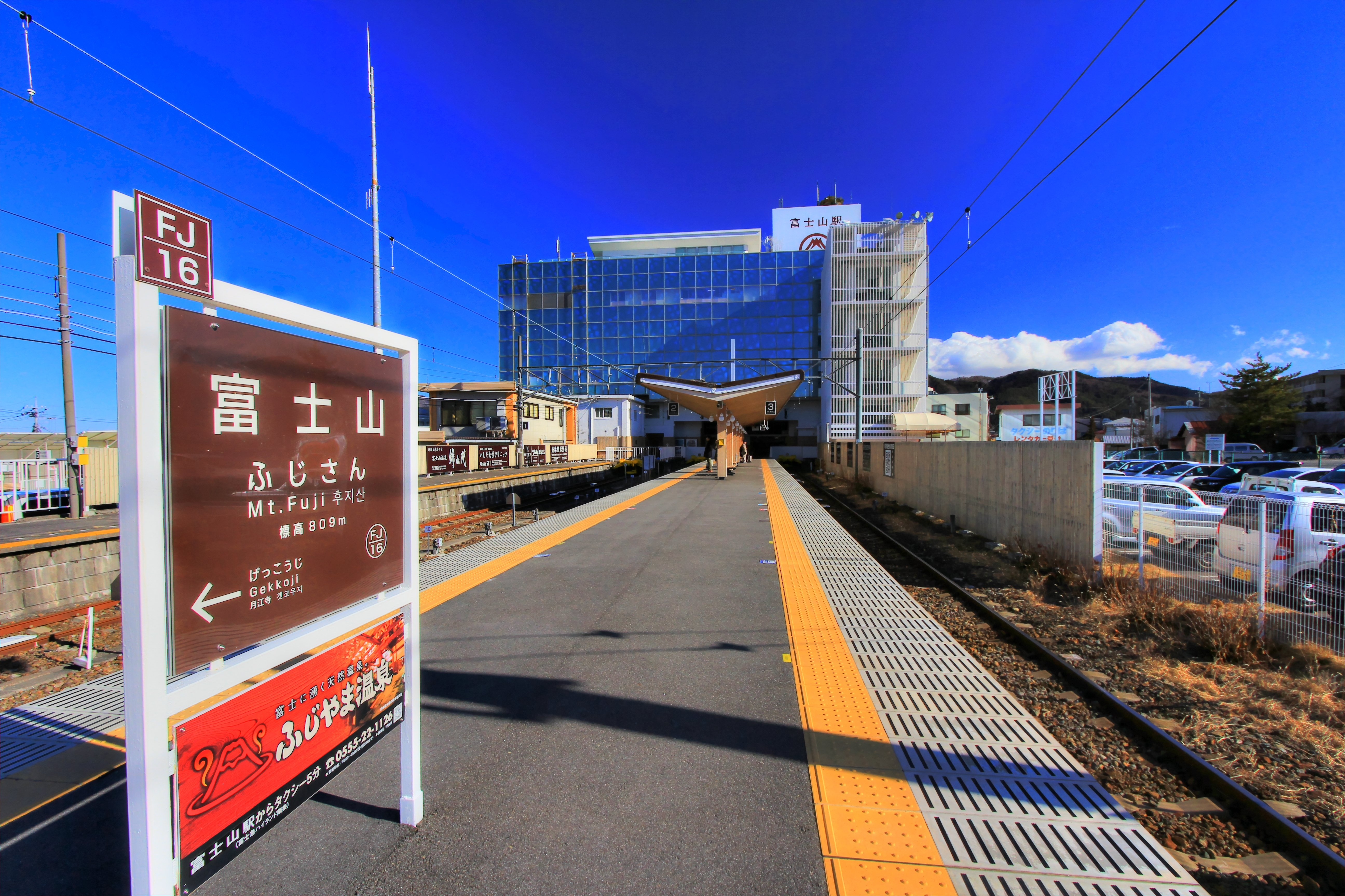 富士山駅